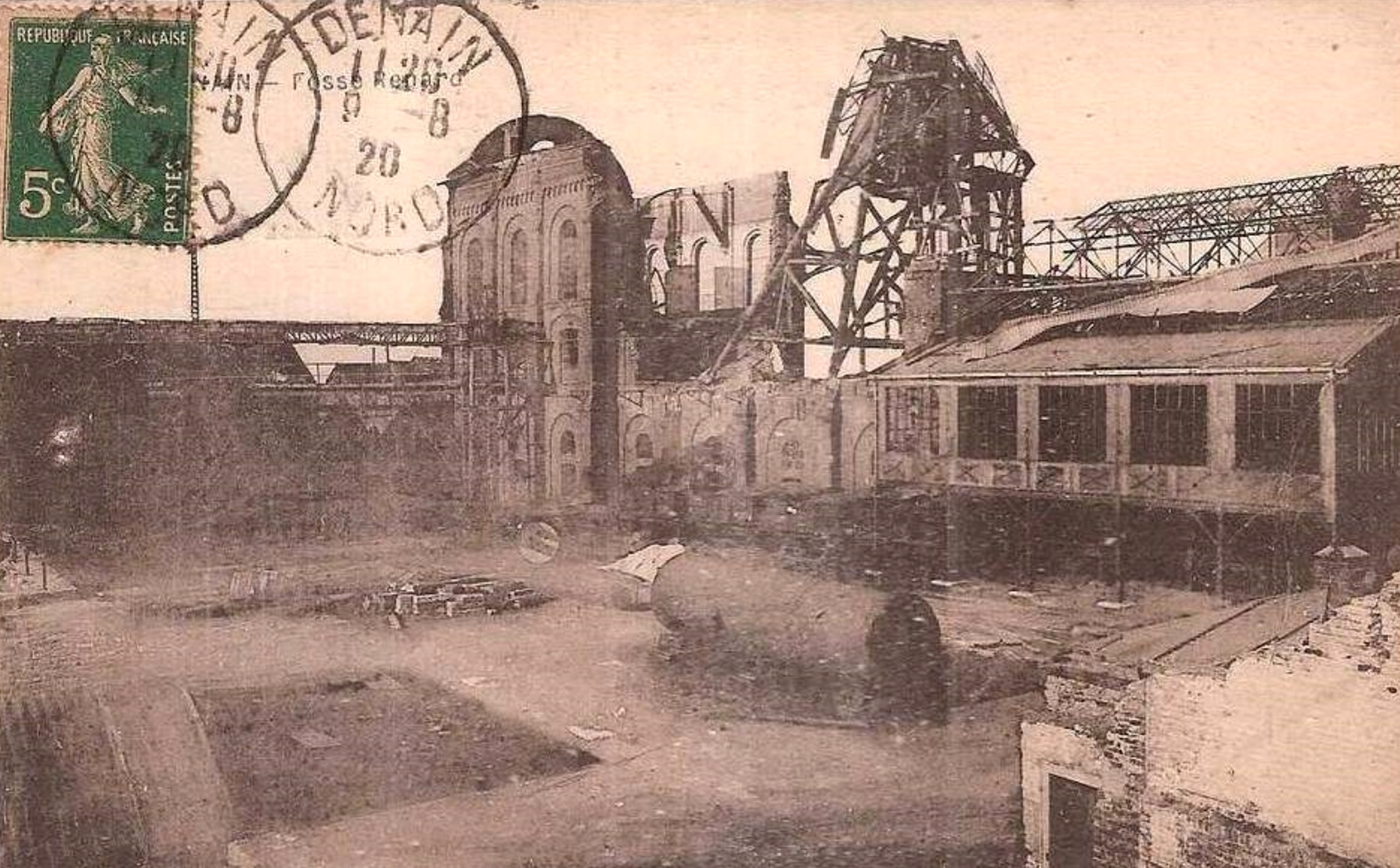 Fosse Renard de la Compagnie des mines d'Anzin, Denain, Nord, Nord-Pas-de-Calais, France.